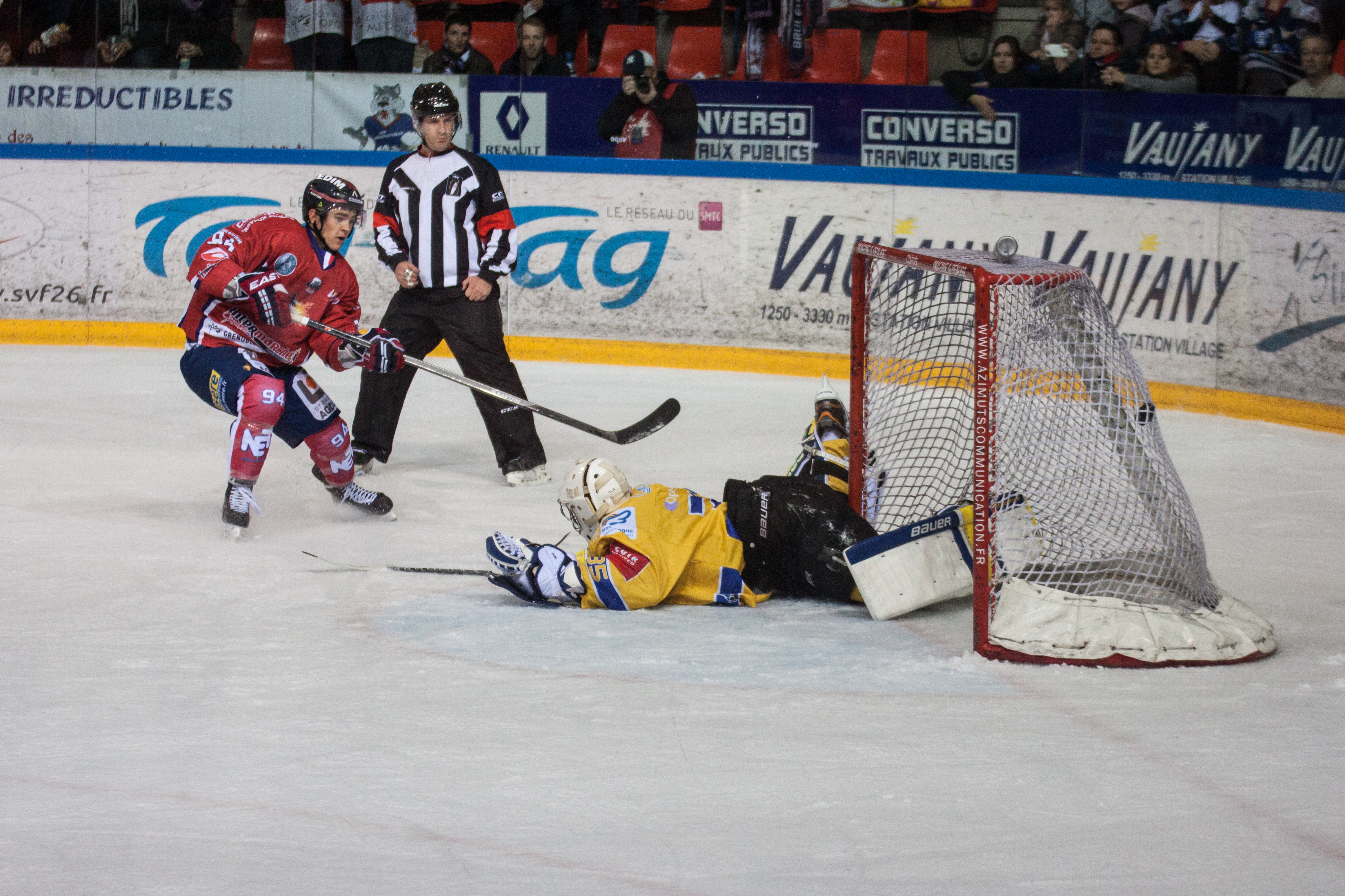 Tir de fusillade de Jordann Perret (Grenoble, #94) sur Henri-Corentin Buysse (Dijon) ) à la patinoire Polesud pour le 1/4 final aller de la Coupe de la ligue 2015.